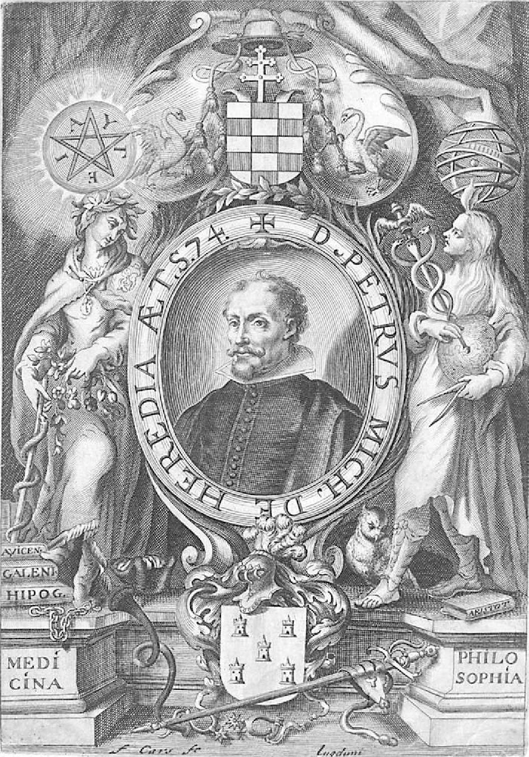 Pedro Miguel de Heredia (1579 - 1655) médico español, catedrático de la Universidad de Alcalá, médico de cámara de Felipe IV. Retrato de 1665 grabado por Jean-François Cars. Presenta una Inscripción en latin en el marco ovalado: "D. PETRVS MICH. DE HEREDIA AET S. 74".